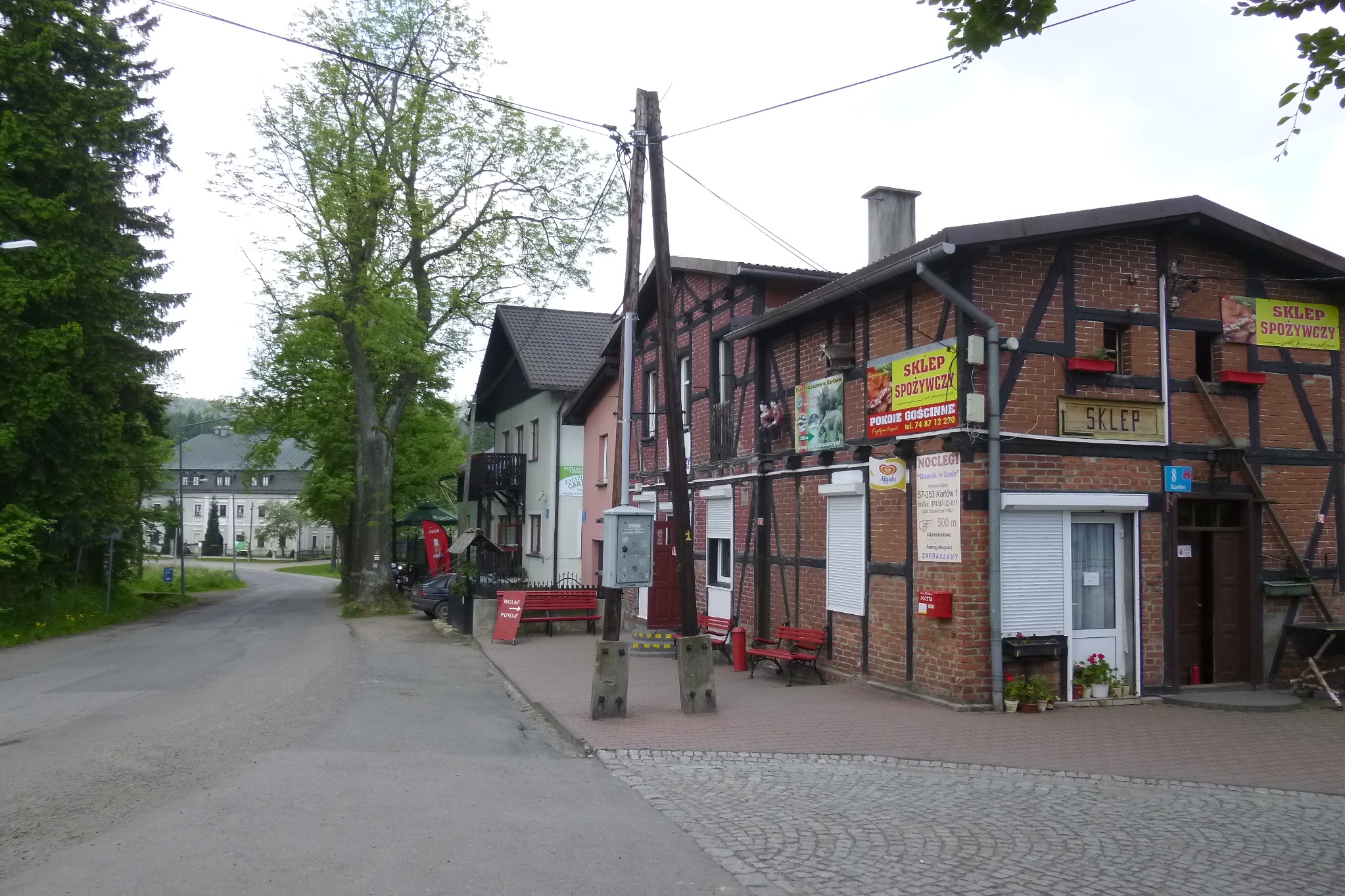 Karłów, 09-06-2013